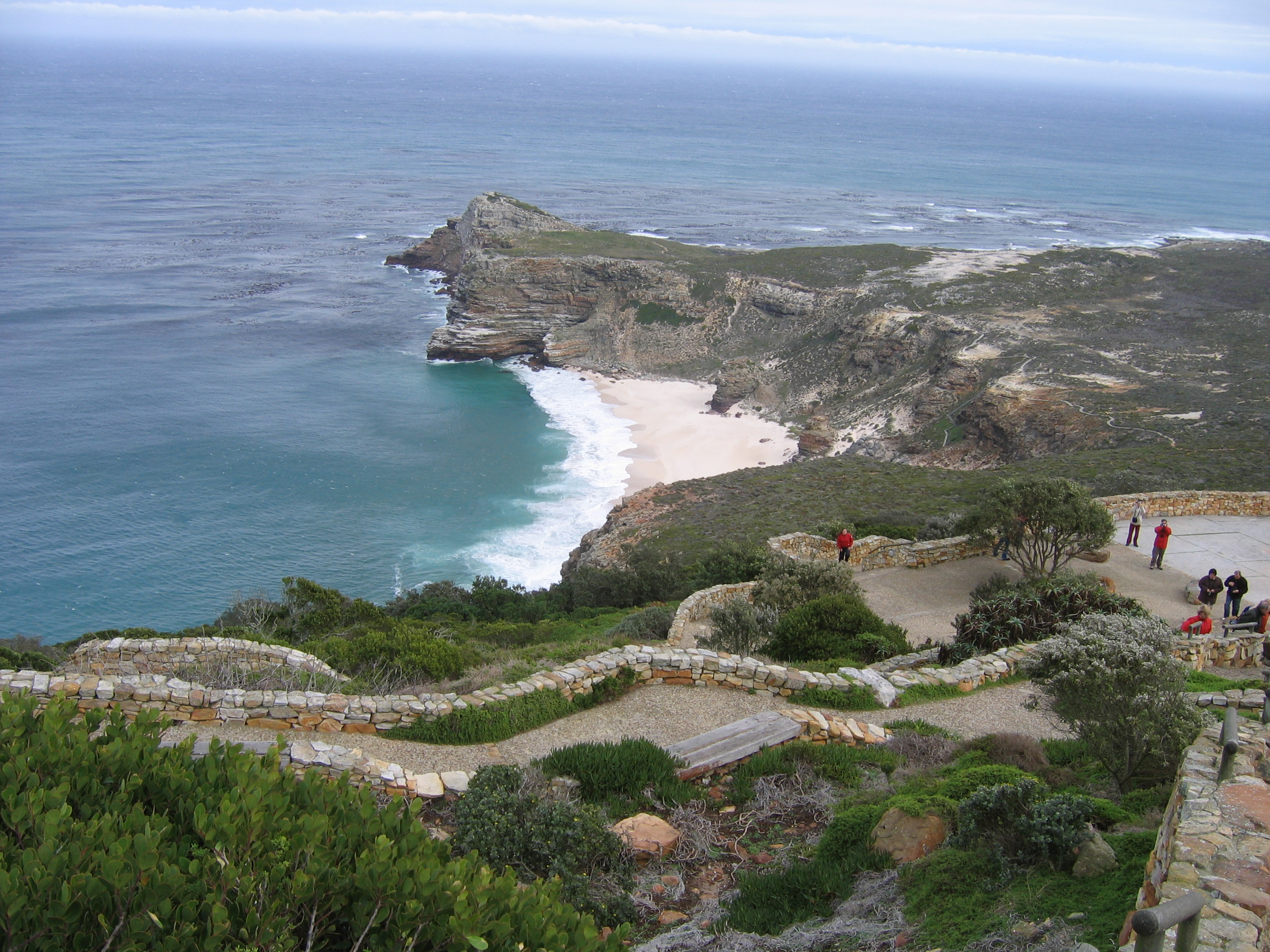 Luc Wauquiez, La pointe du cap de bonne espérance